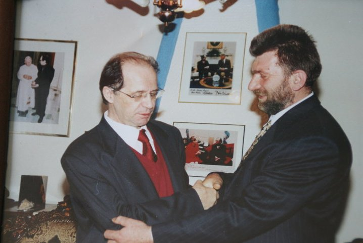 Presidenti I.Ruguva dheAver Husaj